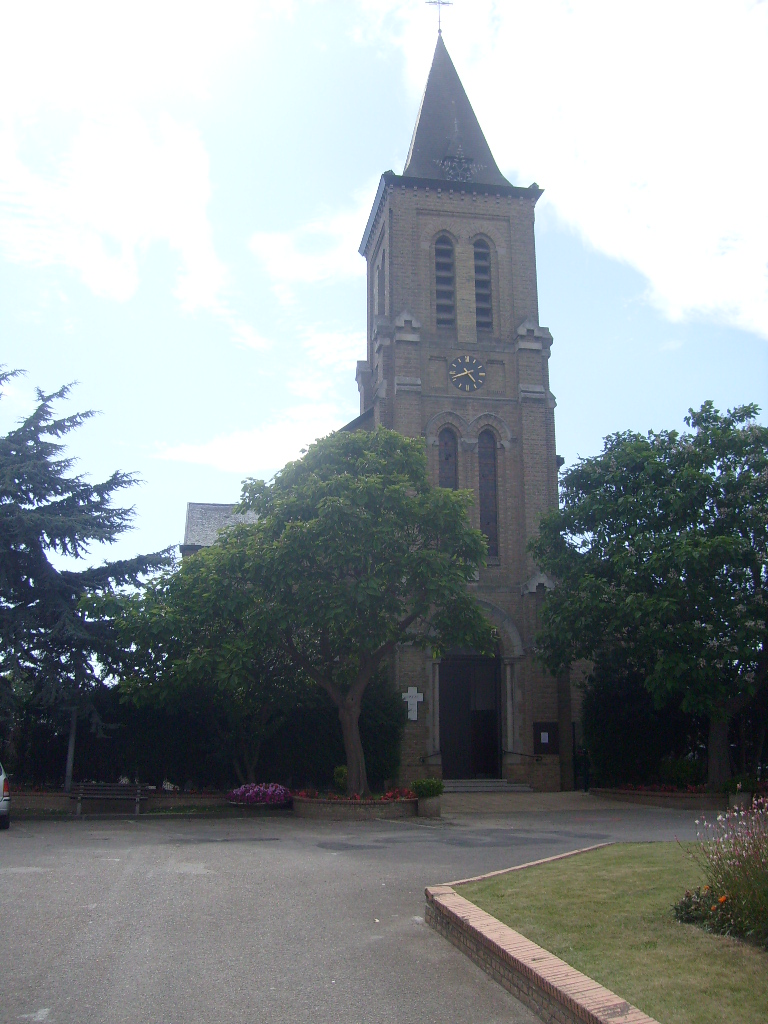 L'église de Ghyvelde